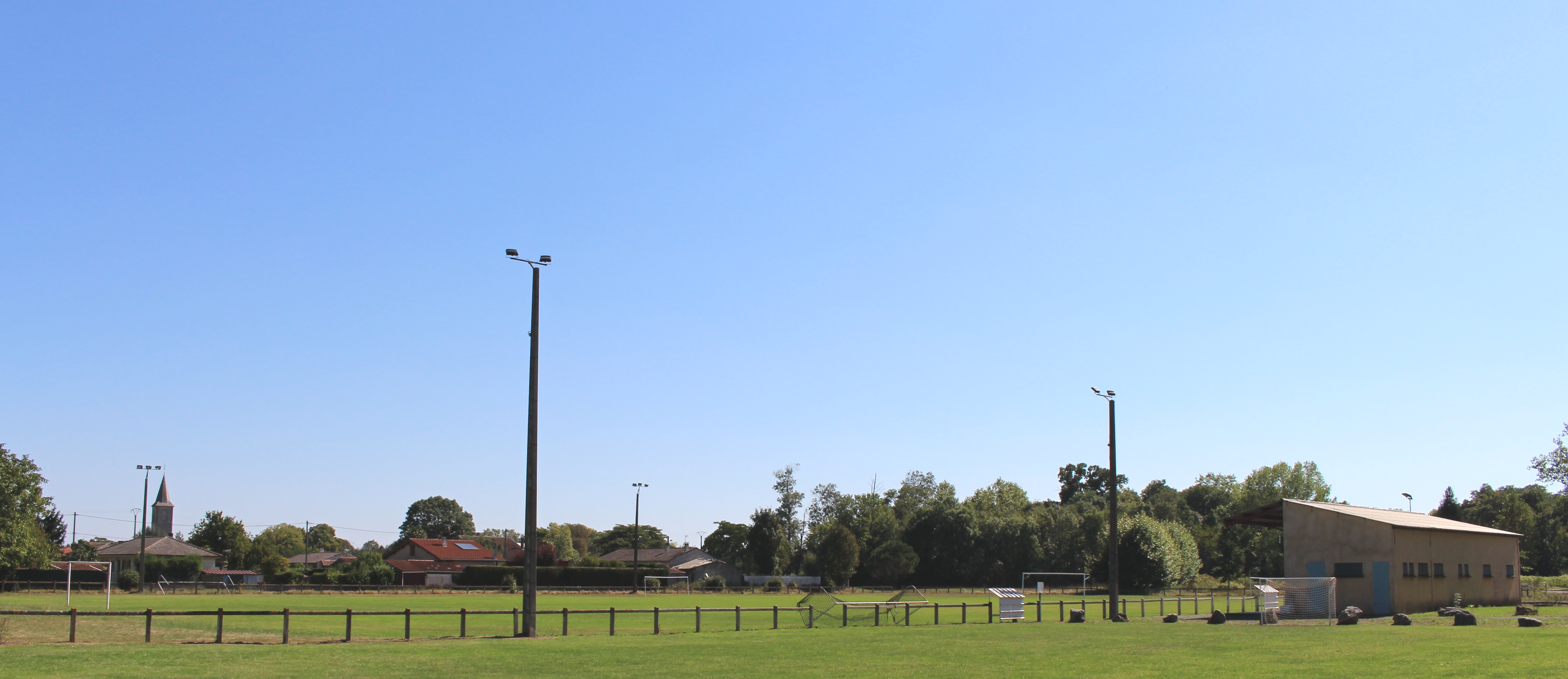 Stade de football de Bazillac (Hautes-Pyrénées)